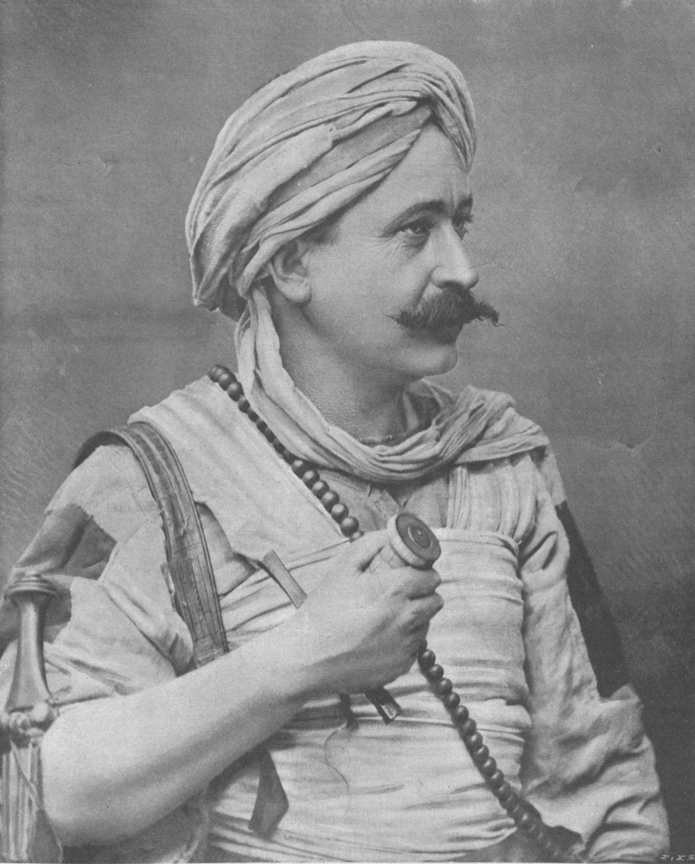 Rudolf Anton Carl Freiherr von Slatin (1857-1932)